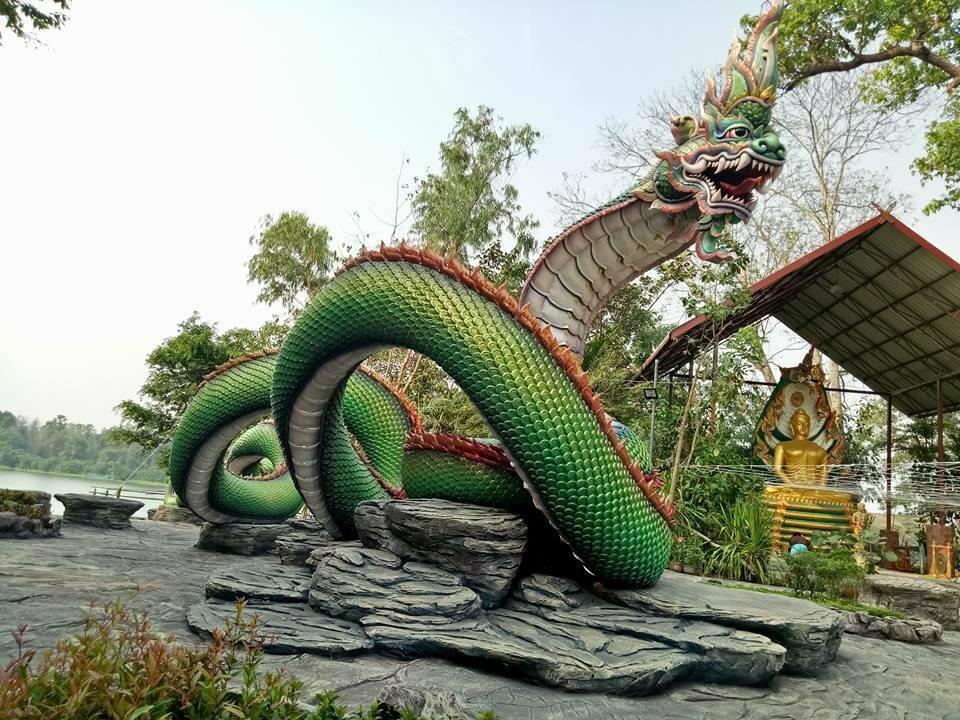 วัดป่าปากโดมเทพนิมิต